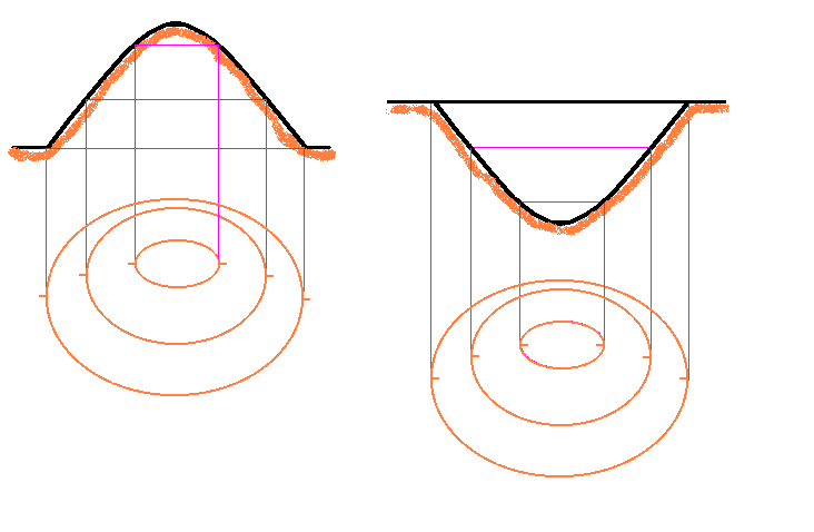 Eséstüske